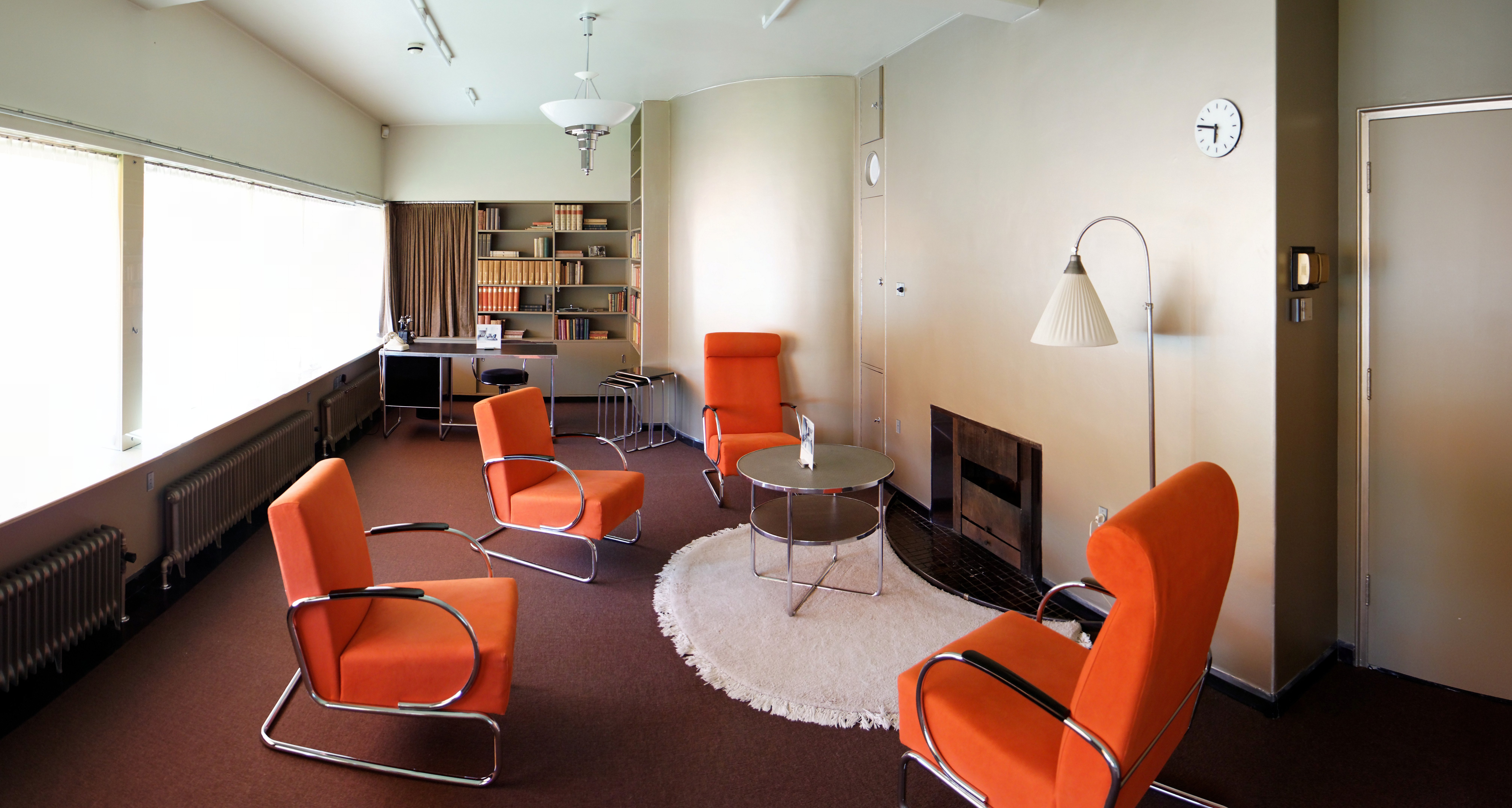 Titel: Fauteuil Gispen 407 Jaar: 1933 Ontwerper: W.H. Gispen Omschrijving: Herenmodel fauteuil, uitgevoerd in hoogglans chroom en met korte armleggers, met oranje-rode bekleding. Collectie: NAi Objectnummer: 266Titel: Plafondlamp Giso 263 Jaar: 1936 Ontwerper: W.H. Gispen Omschrijving: Pendellamp vervaardigd uit hoogglans verchroomd staal en opaalwit glas. Bijzonderheden: Replica Collectie: NAi Objectnummer: 263Titel: Bijzettafeltjes Gispen 23 Jaar: 1933 Ontwerper: W.H. Gispen Omschrijving: Set van drie bijzettafeltjes van zwart gelakt triplex en een onderstel van verchroomd metalen buis. Collectie: NAi Objectnummer: 23Titel: Bureauset Gispen Jaar: 1933 Ontwerper: W.H. Gispen Omschrijving: Pennenhouderset Collectie: NAi Objectnummer: 120Titel: Telefoon Ericsson Jaar: Onbekend Ontwerper: PTT / NORM 51 Omschrijving: Zwart gelakt metalen toestel, tafelmodel met kunststof draaischijf. Collectie: NAi Objectnummer: 210 Overzicht bibliotheek. Deze foto bestaat uit 10 afzonderlijke foto's welke samen de panorama vormen. Zie voor de individuele foto's.